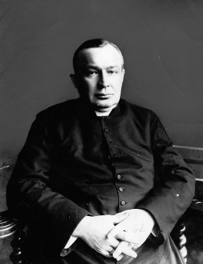 Biskup Arkadiusz Lisiecki